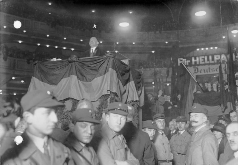 Zu der Reichspräsidentenwahl! Professor Hellpach, Präsidentschaftskandidat der Demokraten, sprach am 26. März unter Anwesenheit Zehntausender im Sportpalast in Berlin. Präsidentschaftskandidat Hellpach während seiner Rede im Sportpalast.